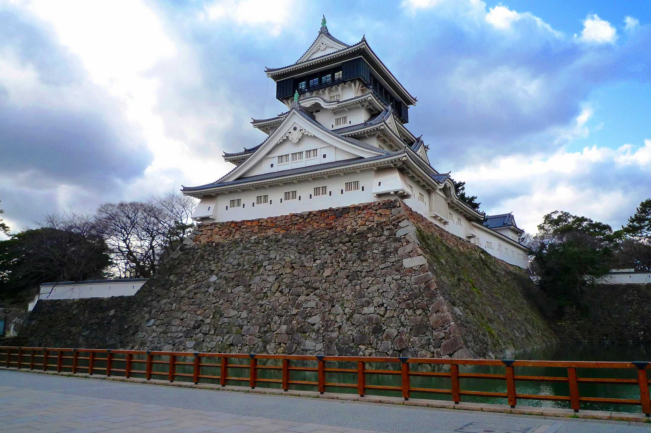 小倉城天守